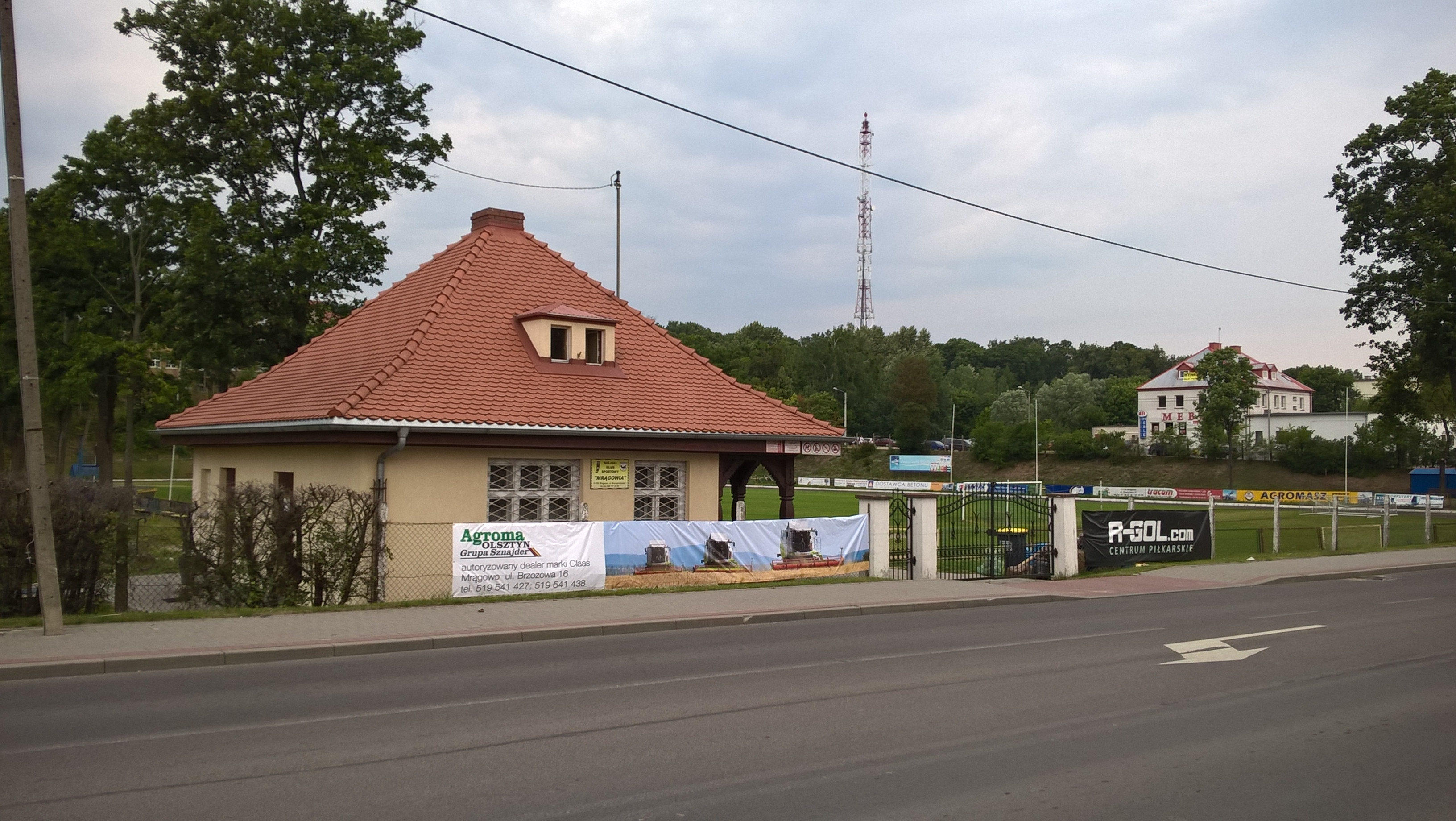 Ulica Mrągowiusza w Mrągowie